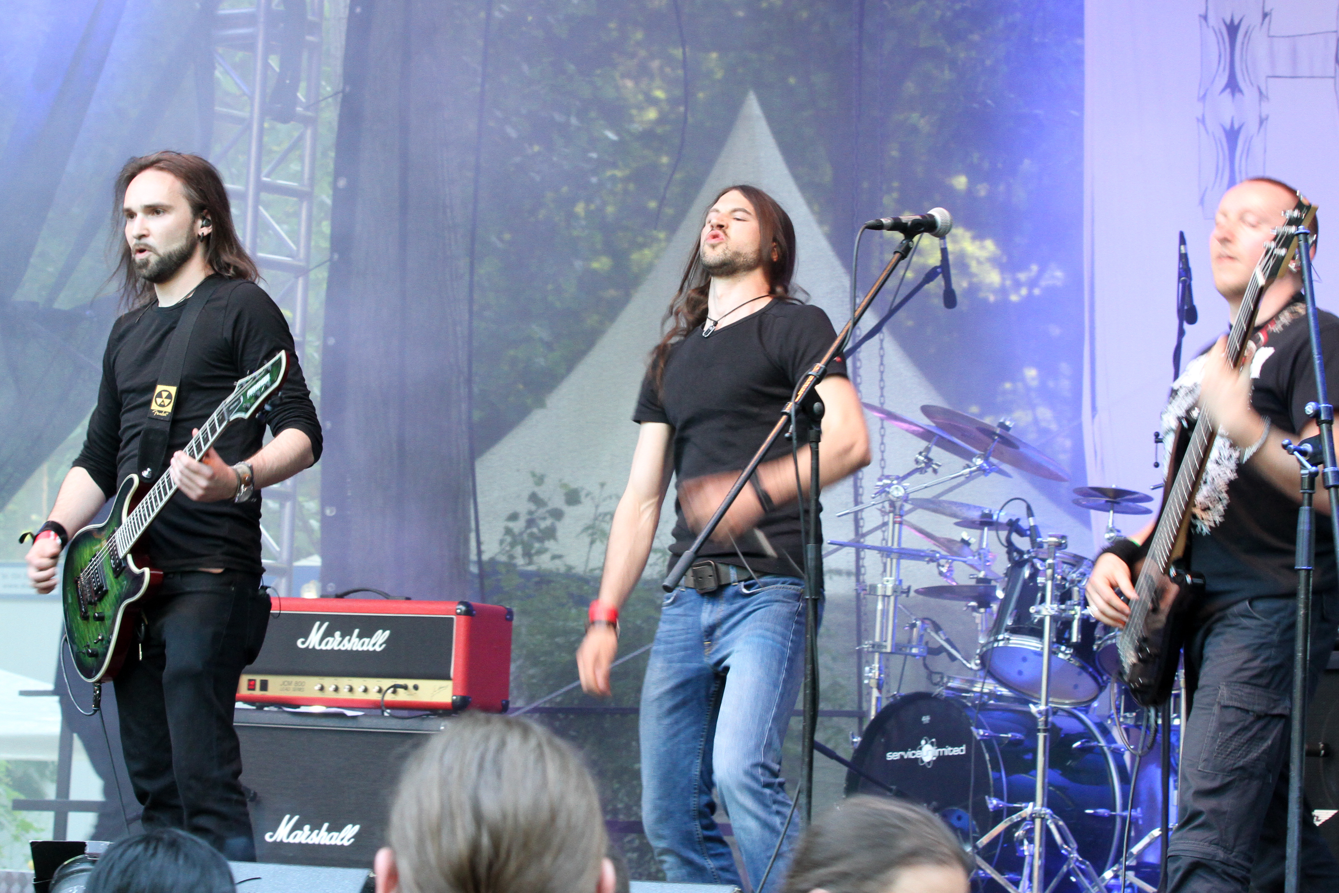 Die Metal-Band Fjoergyn auf dem Wave-Gotik-Treffen (Heidnisches Dorf) 2013 in Leipzig.